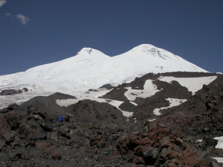 Elbrus, West- und Ostgipfel von der Gipfelstation der zweiten Sektion der Seilbahn fotografiert, Sommer 2004 GNU-FDL